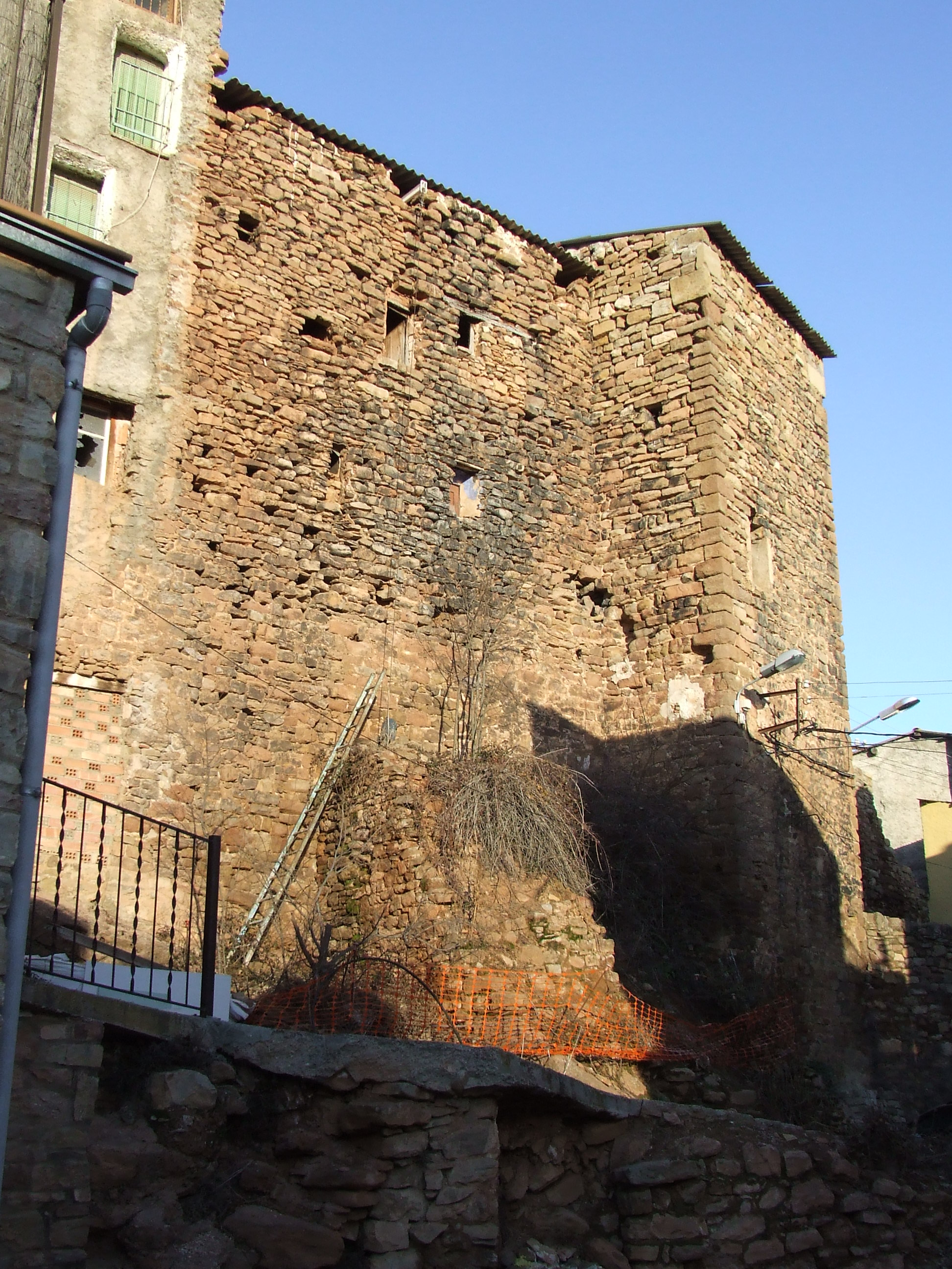 Castell de Vilamitjana (Tremp, Pallars Jussà)